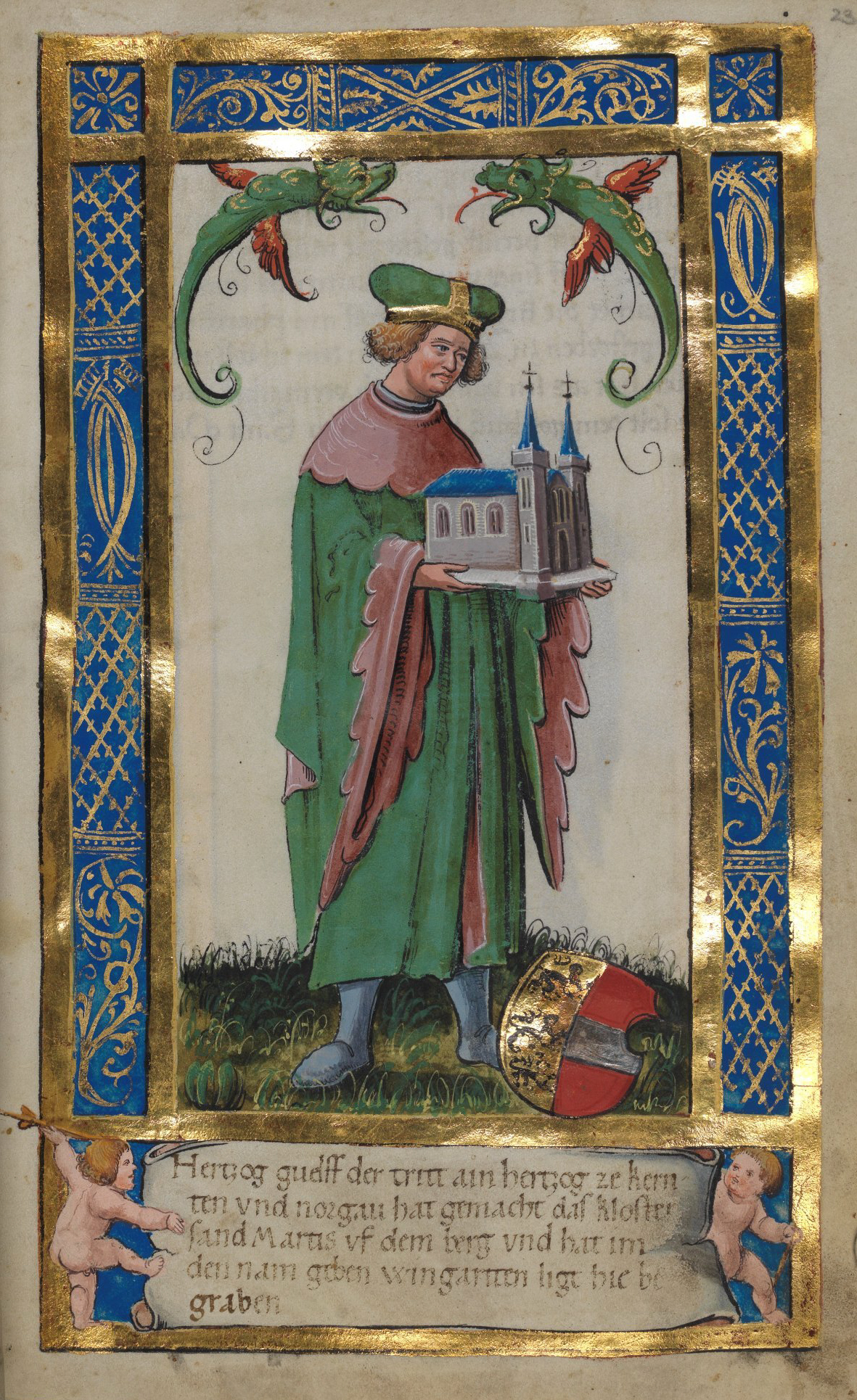 Weingartener Stifterbüchlein, Württembergische Landesbibliothek Stuttgart, Cod.hist.qt.584, fol. 23r, Stifterbild Welf III. Hertzog guelff der tritt ain hertzog ze kernten vnd norgau hat gemacht das kloster sand Martis vf dem berg vnd hat im den nam gegeben wingartten ligt hie begraben